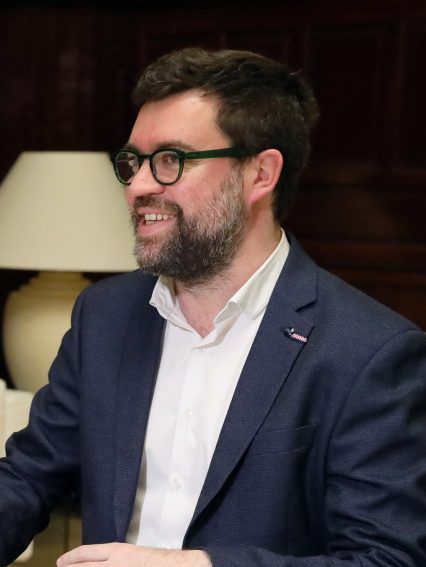 La alcaldesa de Madrid dialoga con el alcalde de Palma sobre el problema de la vivienda. 22/01/2019. La alcaldesa de Madrid, Manuela Carmena, se ha reunido hoy en su despacho del palacio de Cibeles con su homólogo de Palma de Mallorca, Antoni Noguera, con motivo de la visita de este a la ciudad por la Feria Internacional de Turismo (FITUR), que se inaugura mañana en IFEMA y que se prolongará hasta el próximo domingo, día 27.